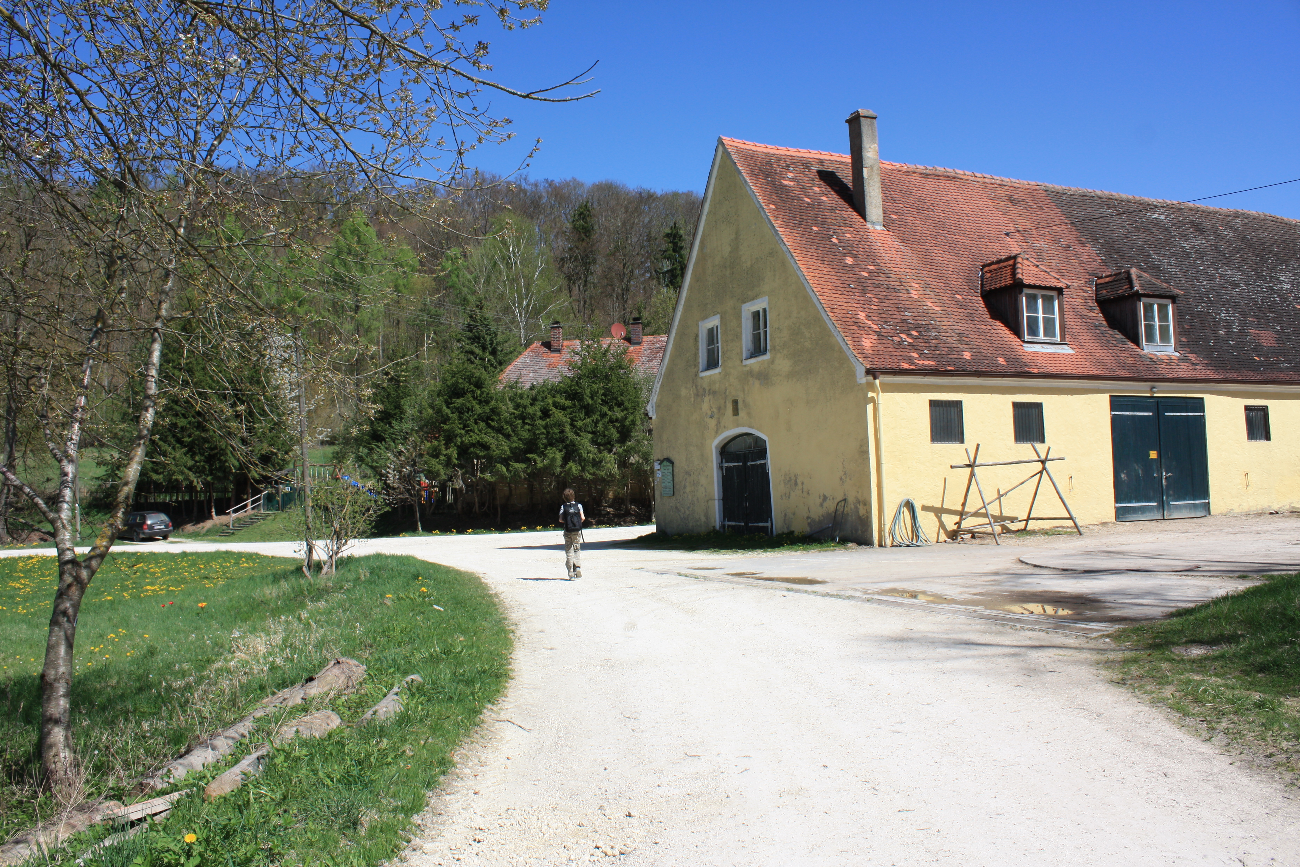 Gebäude in Karlshof (Hohenaltheim). Im Hintergrund das Dach des Forsthauses